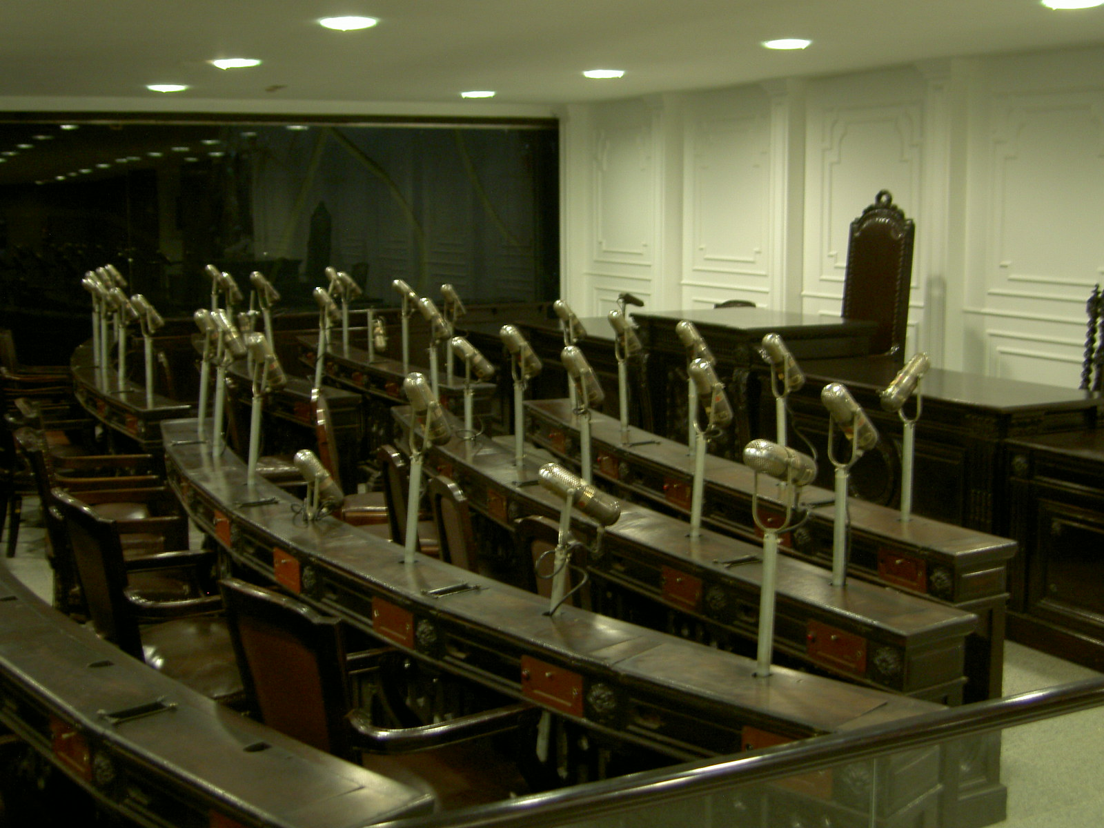 Brazilian parliament in 1960s